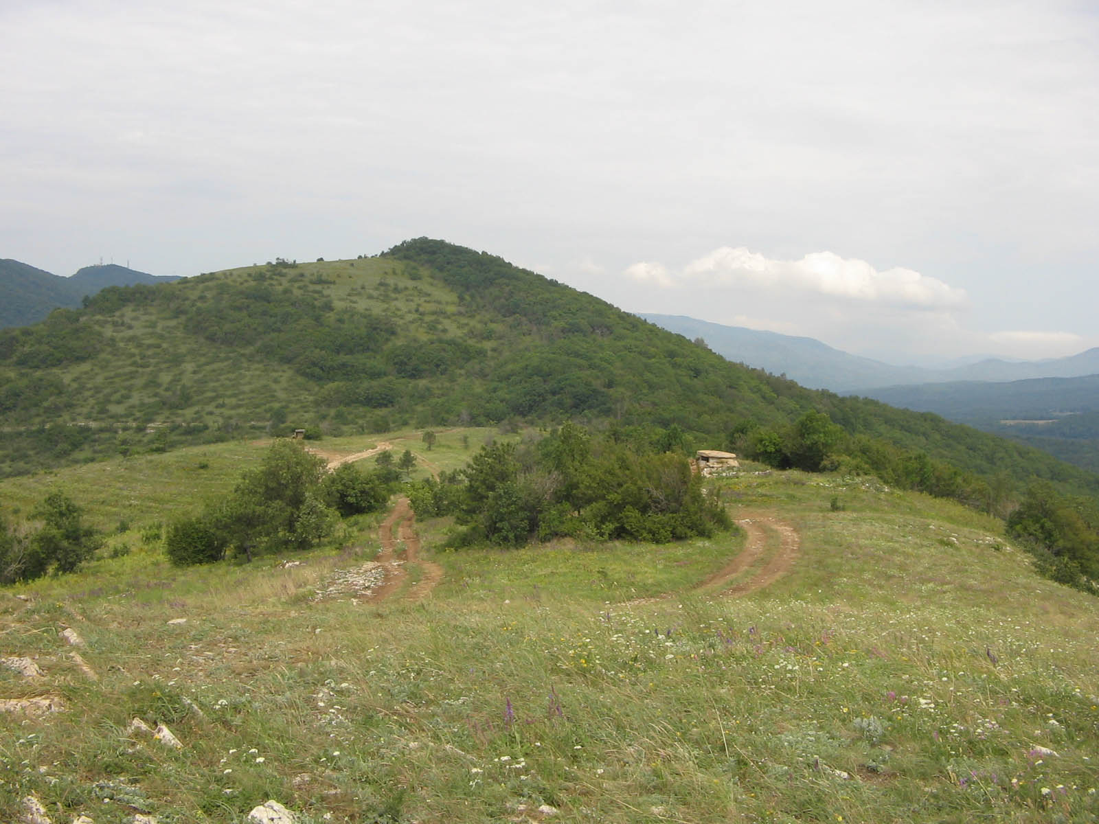 Седловина горы Нексис геленджикского р-на Краснодарского края, Россия. Видны оба дольмена: Лунный (ближний) и Солнечный (дальний.) По седловине проходит грунтовая дорога, но подъем сюда возможен только на полноценных джипах.